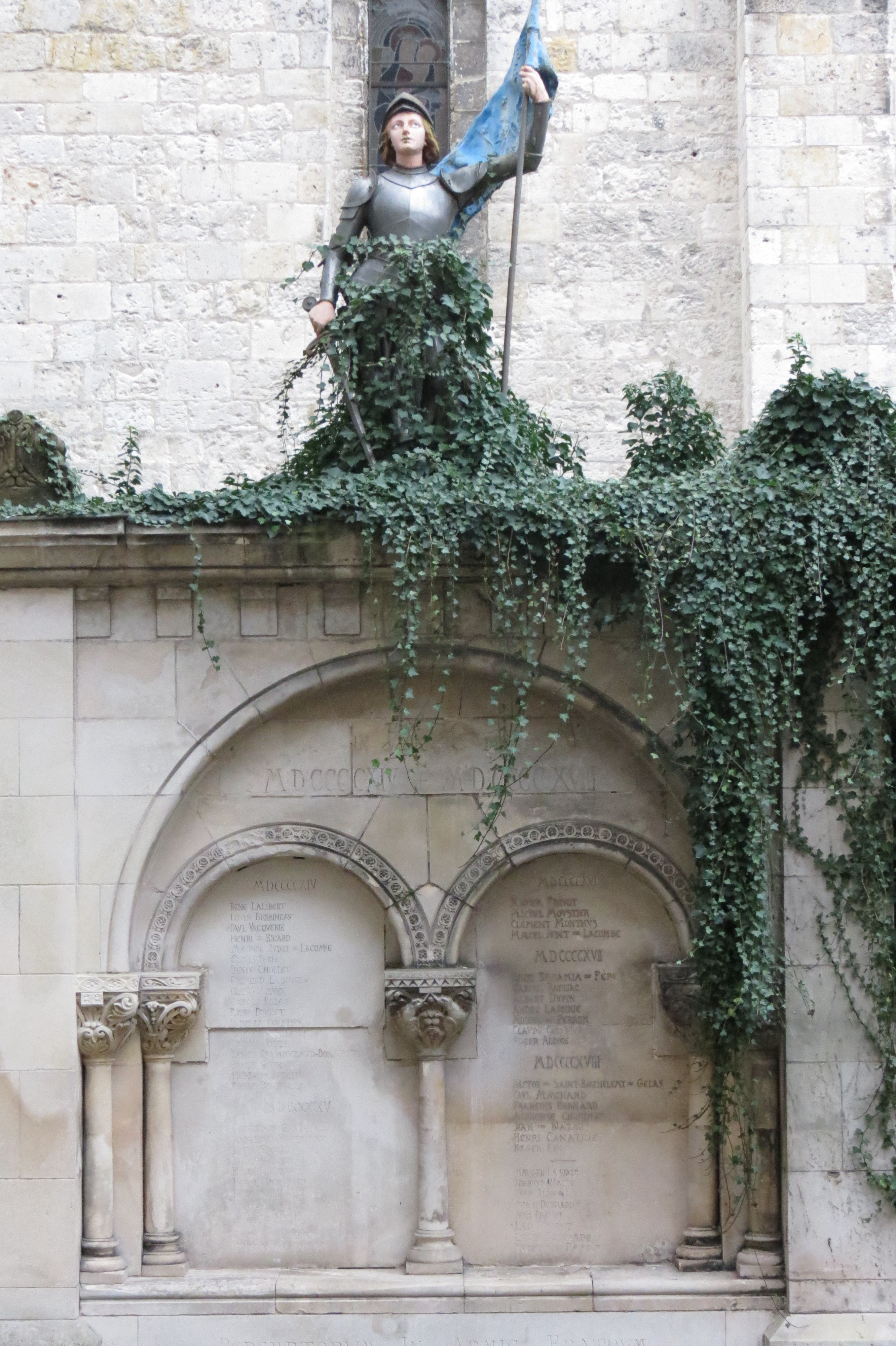 Prise de vue du monument aux morts